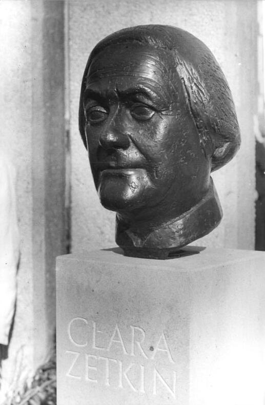 ADN-ZB-Mittelstädt-4.3.87-Berlin: XII.DFD-Kongreß-Zetkin-Park. Am Vorabend des XII.Bundeskongresses des DFD erfolgte die Einweihung und Namensgebung des künftigen Wohngebietsparkes"Clara Zetkin" in Marzahn-Nord. Die auf der Kundgebung von der DFD-Vorsitzenden Ilse Thiele enthüllte Clara-Zetkin-Bronzebüste wurde von dem Bildhauer Walter Arnold geschaffen.